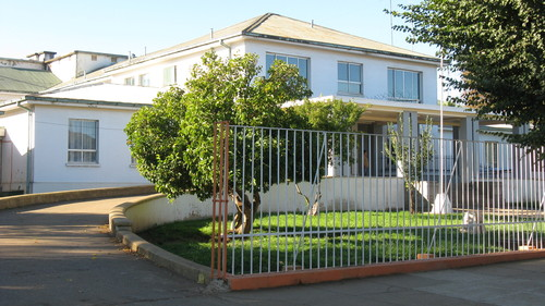 Frontis del Hospital de Traiguén.